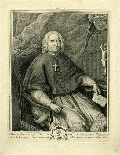 Porträt von Theodorus van der Croon, geboren 7. Juni 1668, Erzbischof von Utrecht (1733-1739), gestorben 9. Juni 1739. Abgebildet sitzend in geistlicher Kleidung, in der linken Hand einen Brief mit dem Wort "Appel".